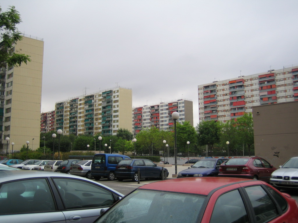 Foto hecha por mi desde la calle Portugal hacía el oeste, el viernes 08 de Julio del 2005 a las 10:22 de la mañana. Con la cámara CANON ixus 40